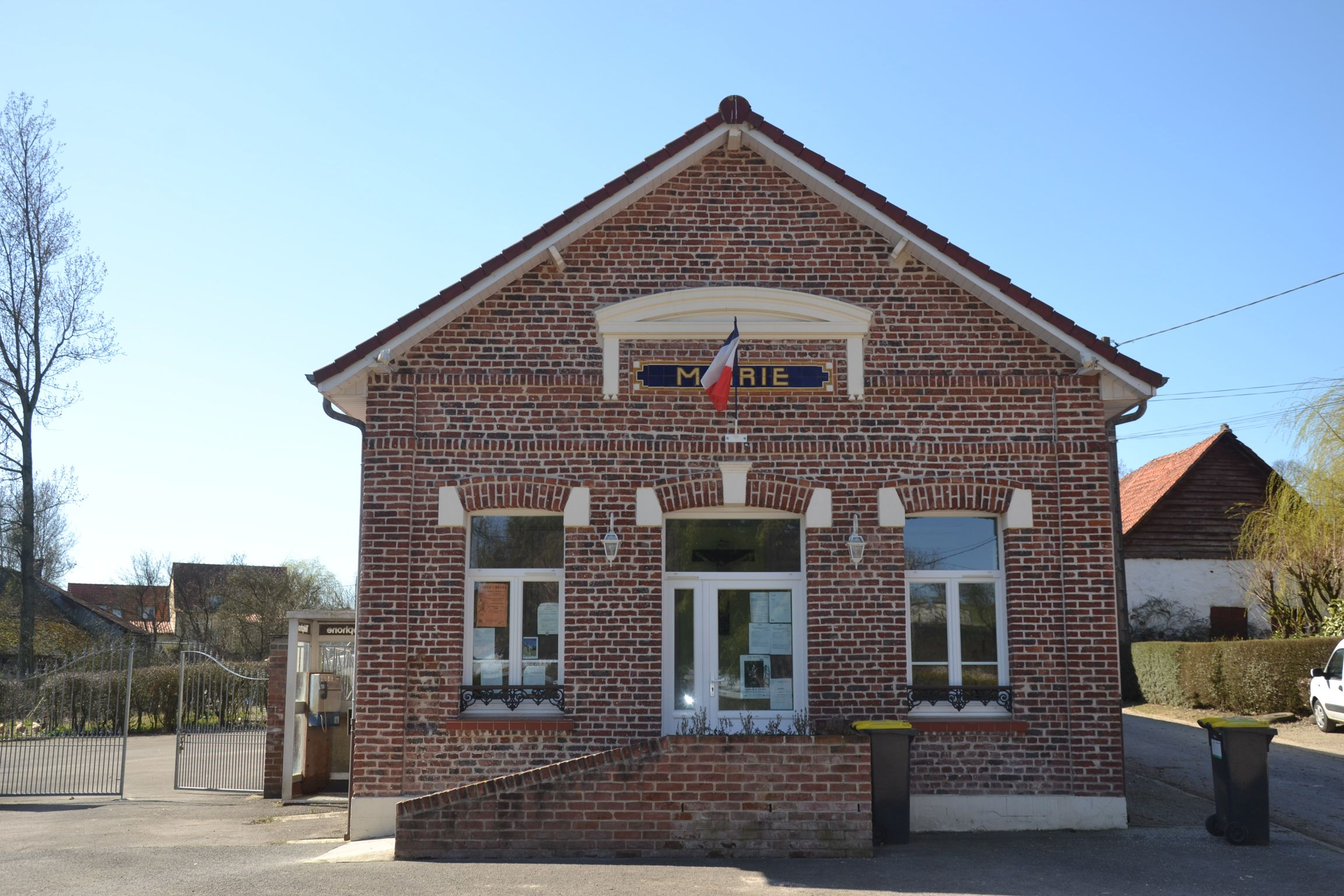 Mairie de Rimboval